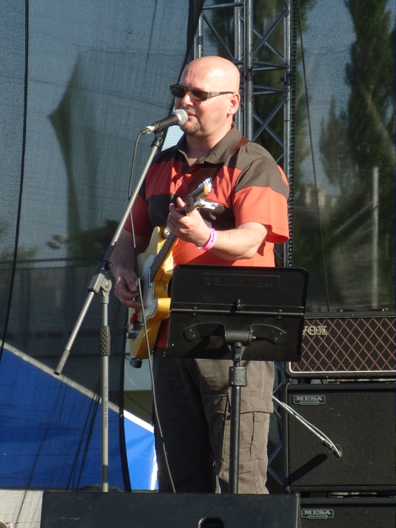 Radek Pastrňák na olomouckém Beerfestu